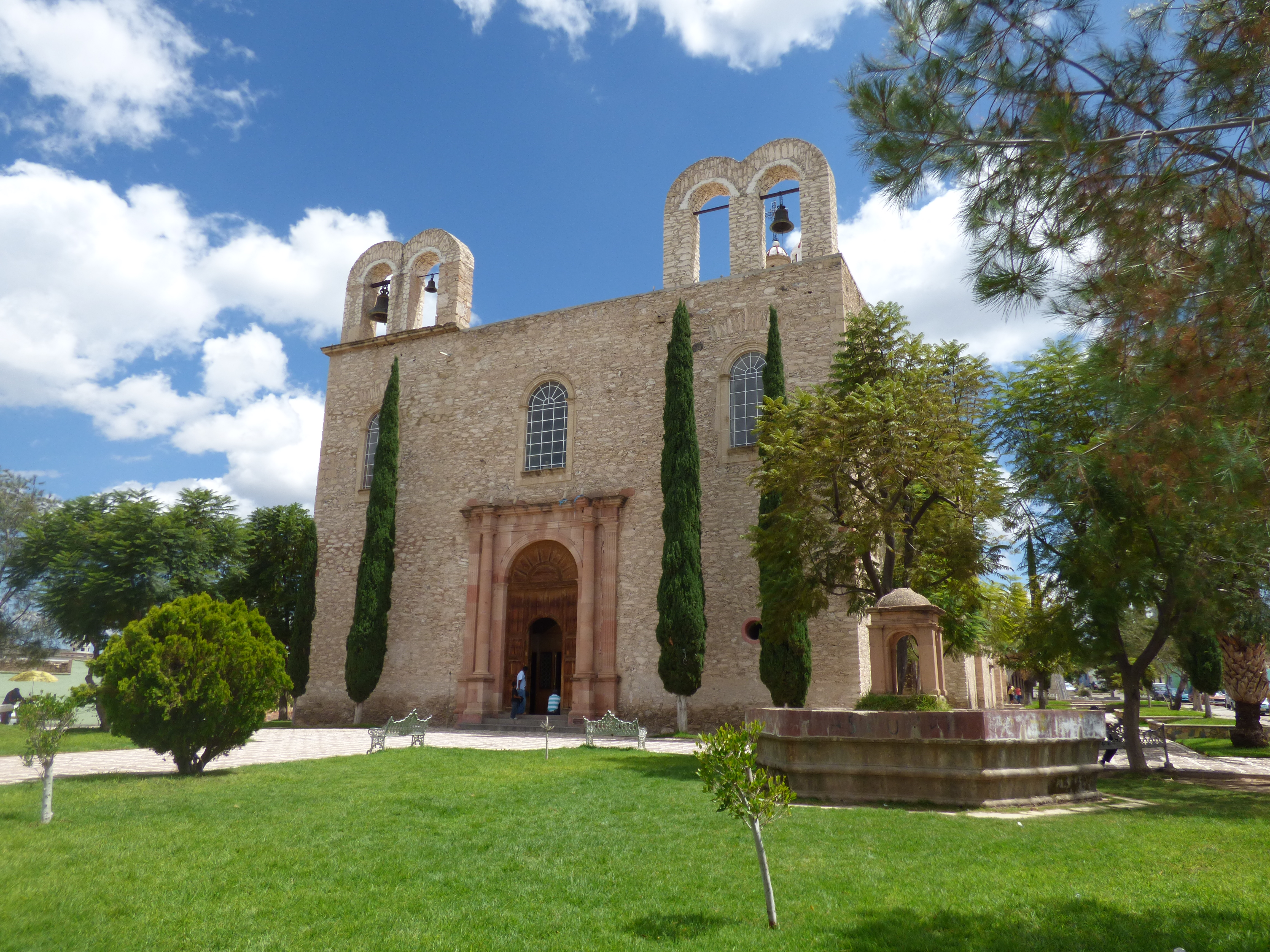 Templo de Nuestra Señora del Refugio, Tepezalá, Aguascalientes, México